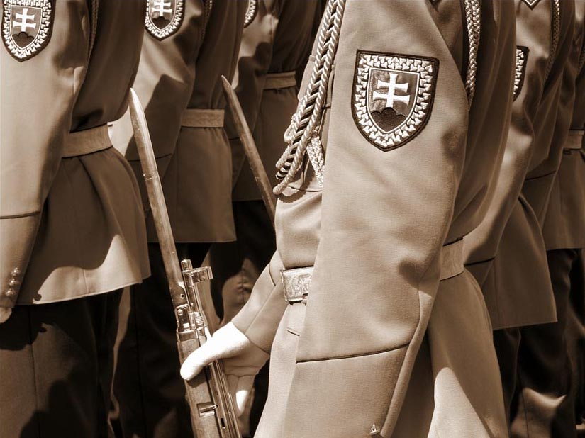 Slovak soldiers on parade.